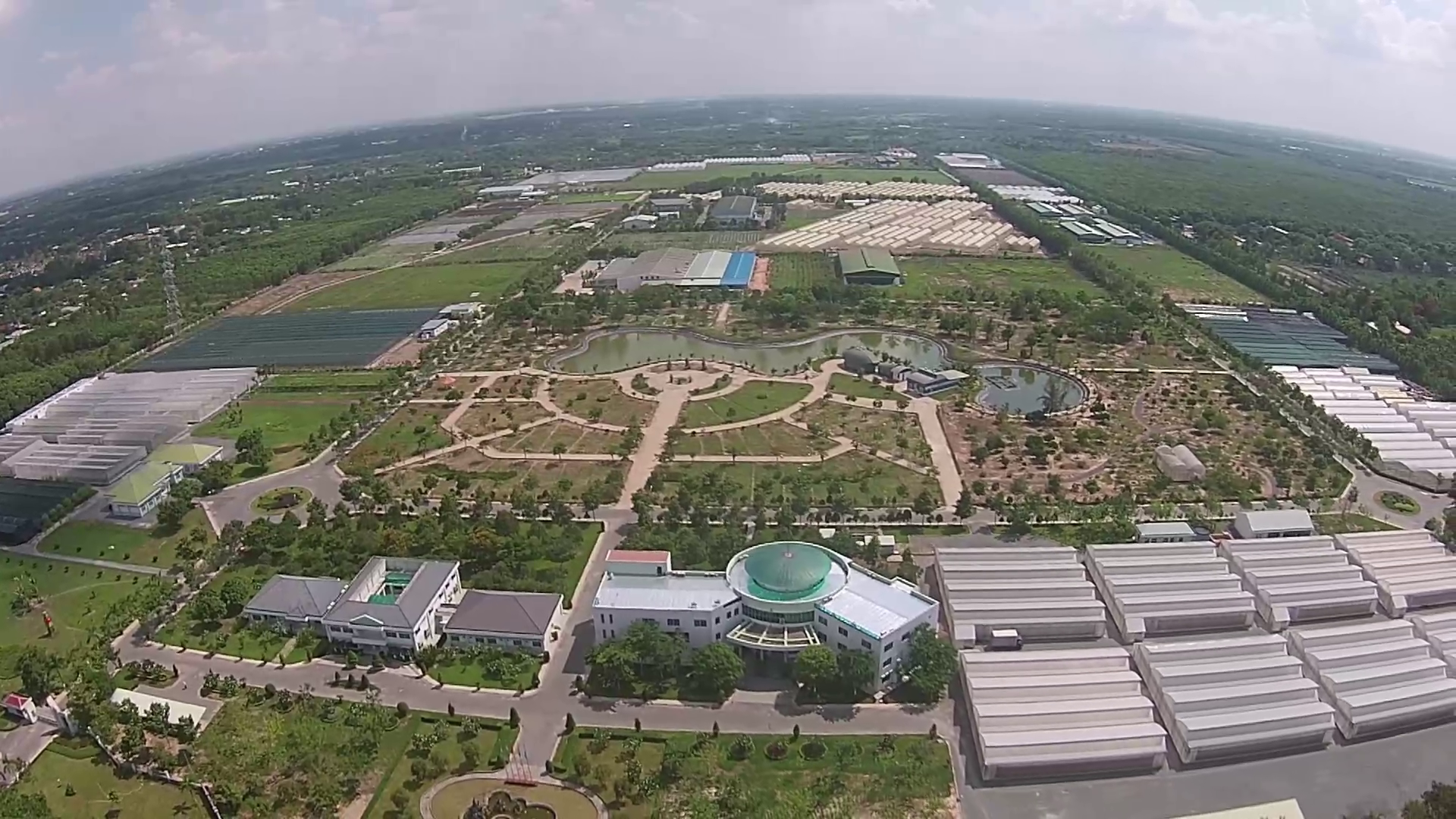 Ảnh chụp AHTP vào 22 tháng 10 năm 2016